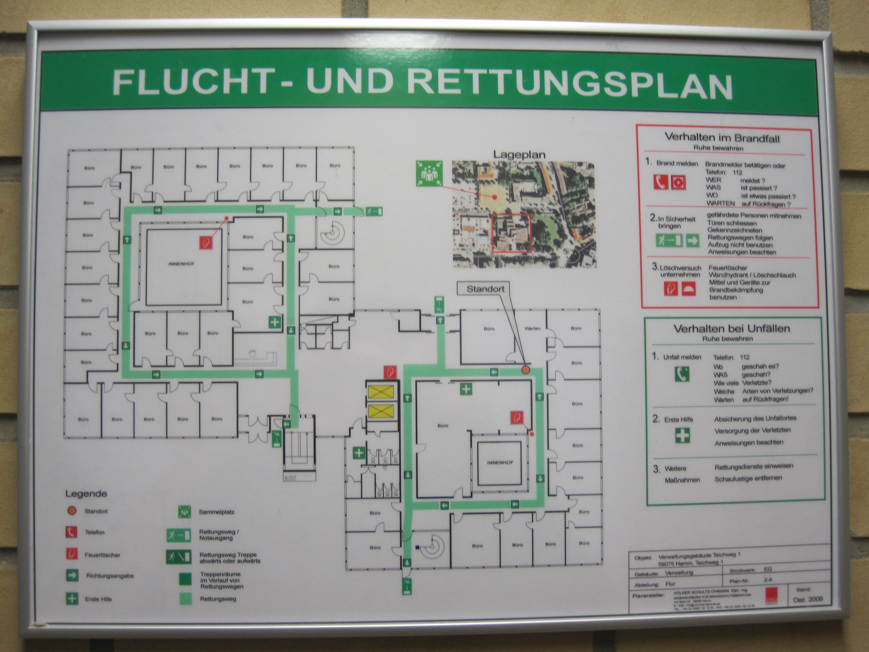 Das Foto zeigt einen Flucht- und Retungsplan des Rathauses Bockum-Hövel.